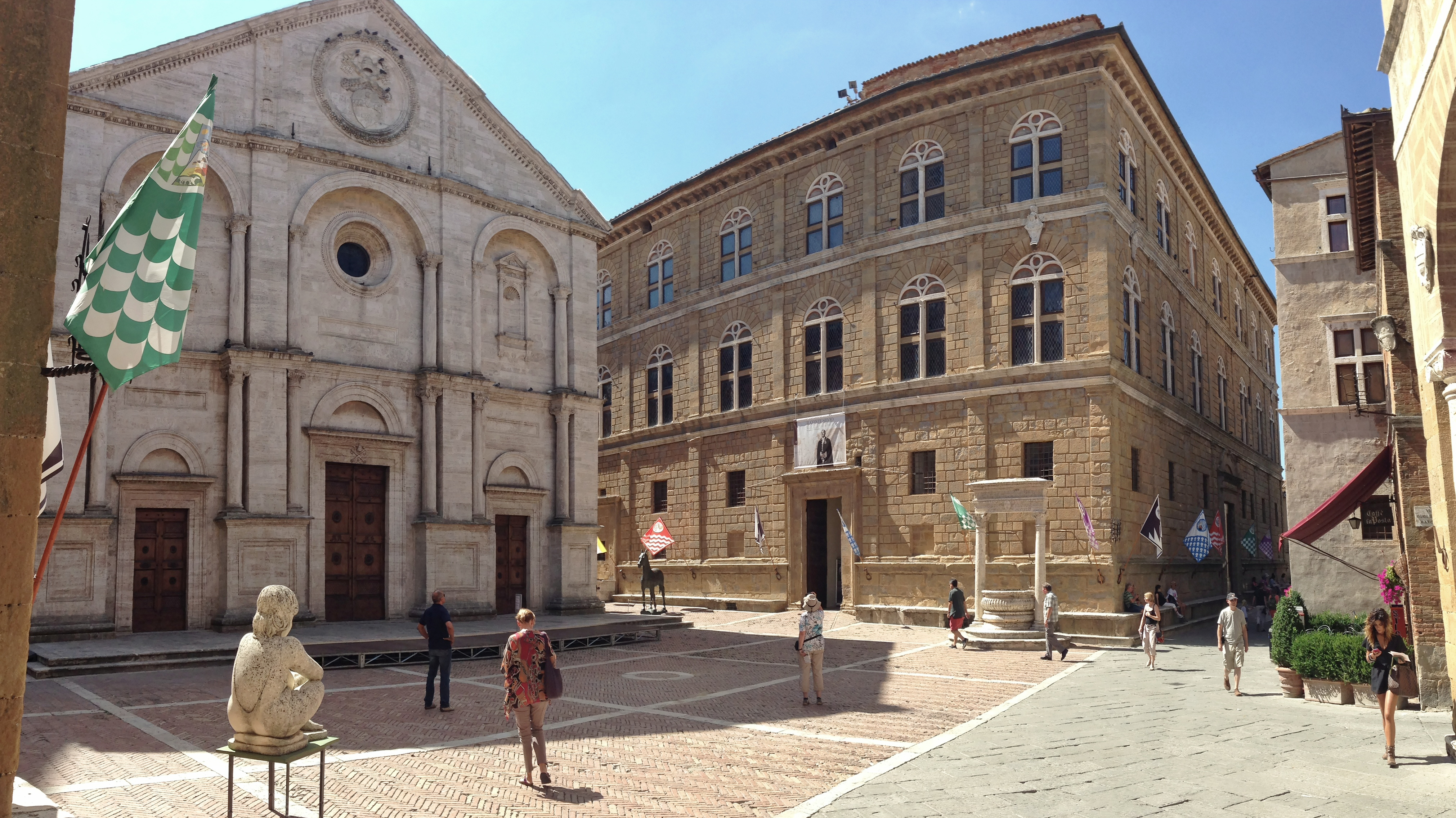 Piazza Pio II im Zentrum von Pienza (Toskana, Italien)